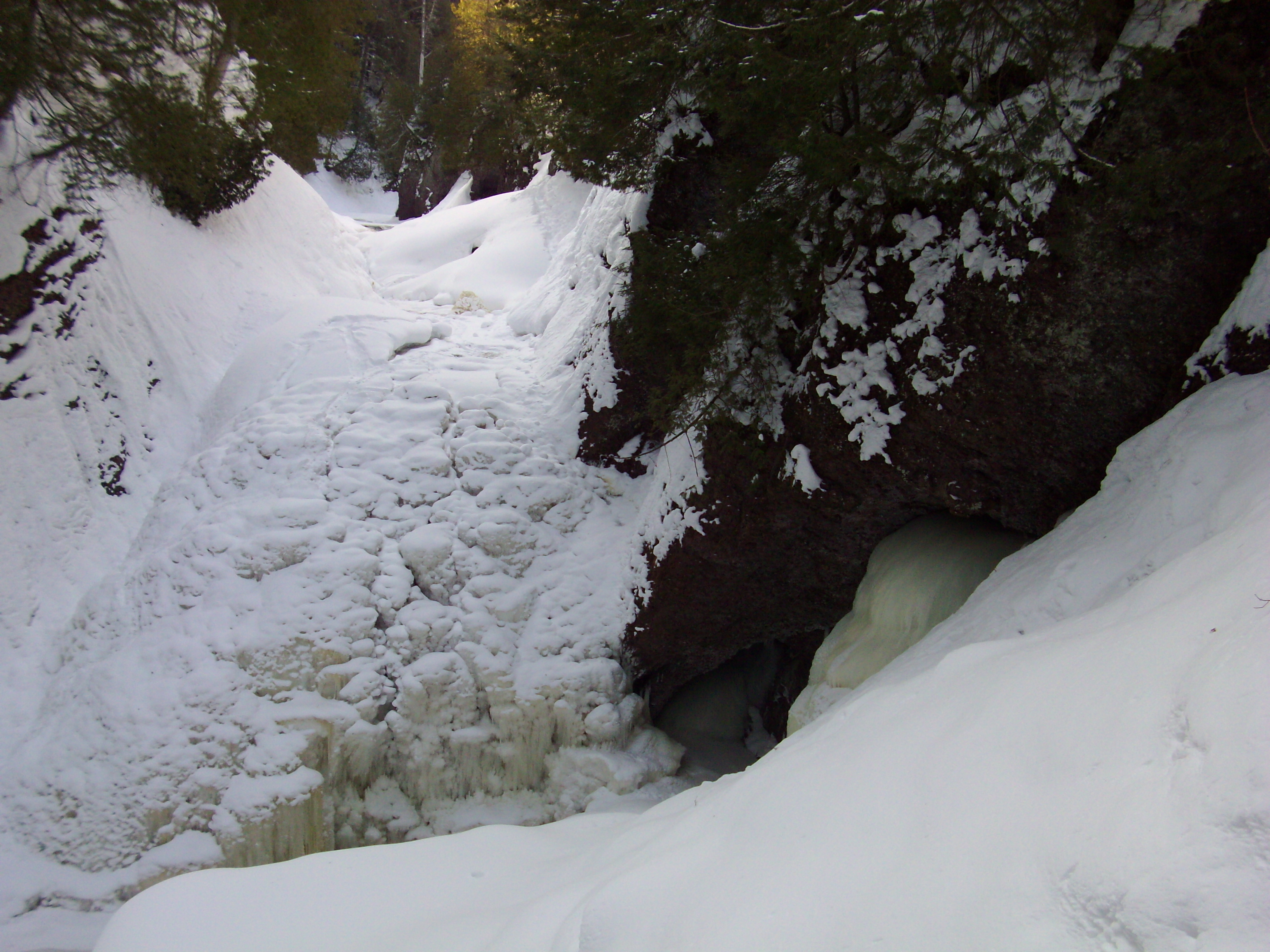 Gorge Falls in Winter, Black River, Gogebic County, Michigan